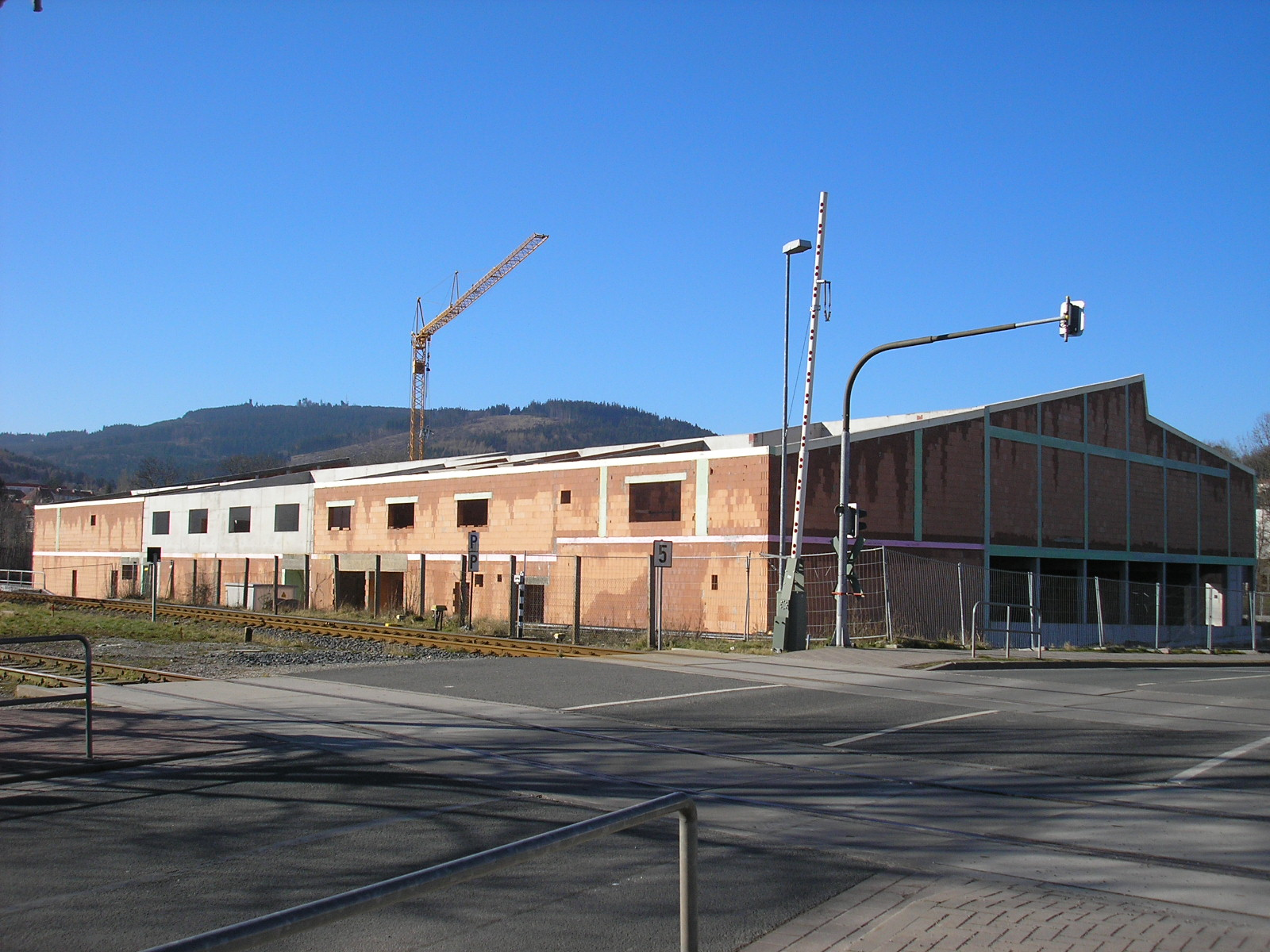 Die Eishalle Ilmenau (in Bau) im Februar 2007 von Nordosten betrachtet.